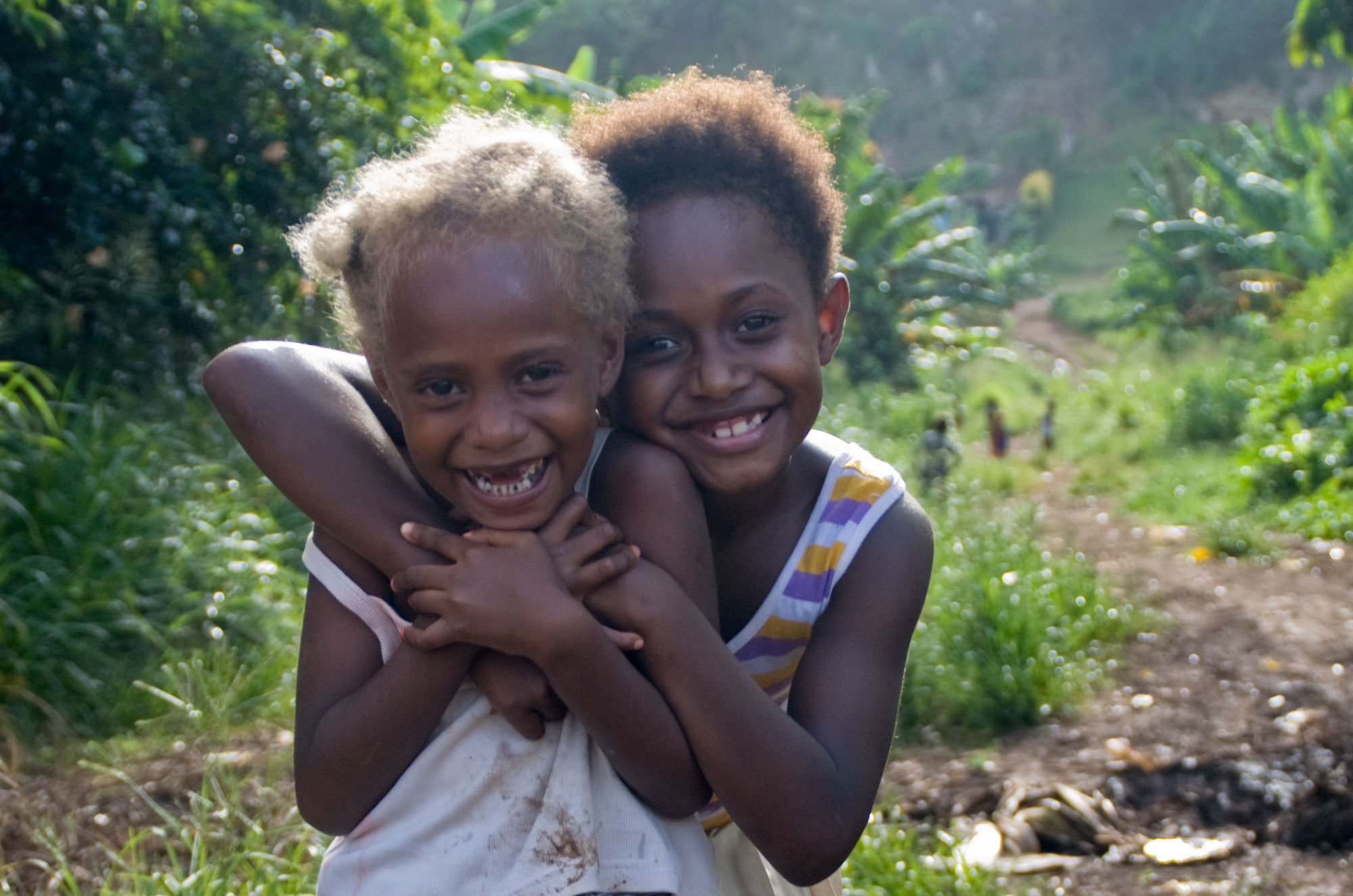 Two Vanuatu girls